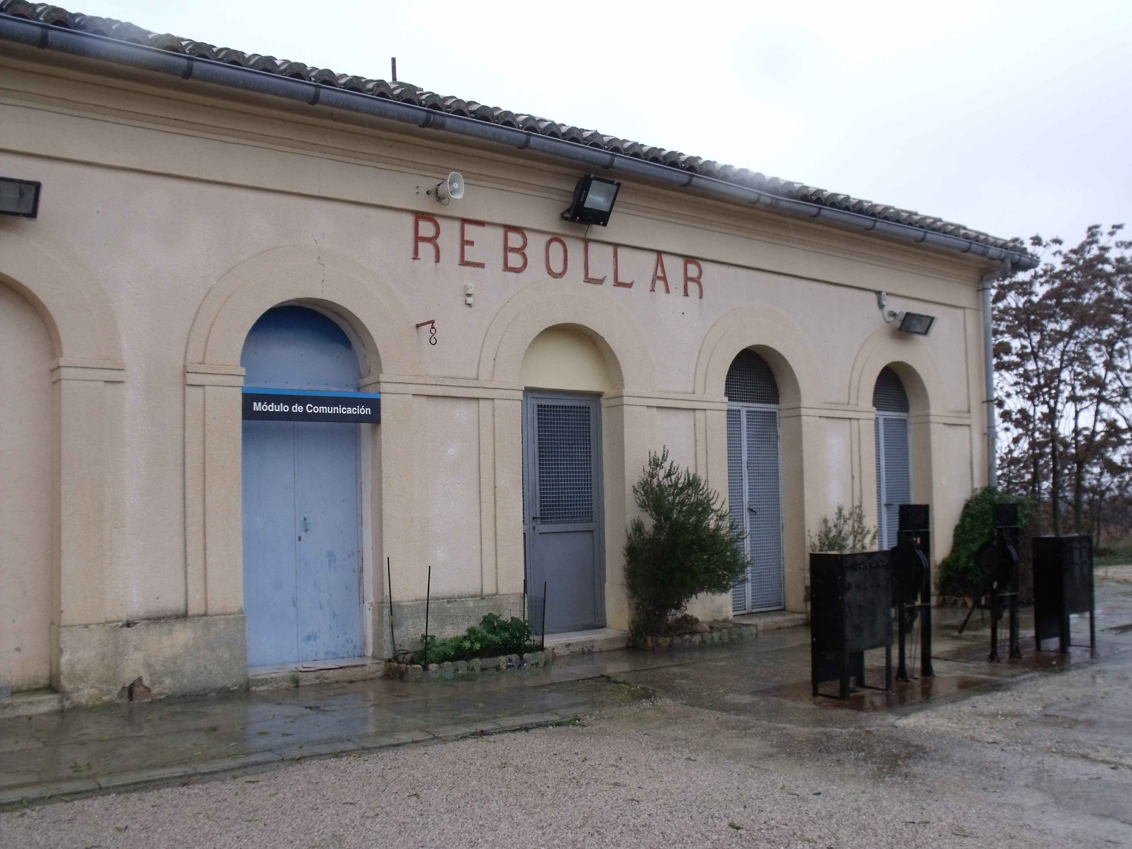 Diversas vistas de la estación de El Rebollar